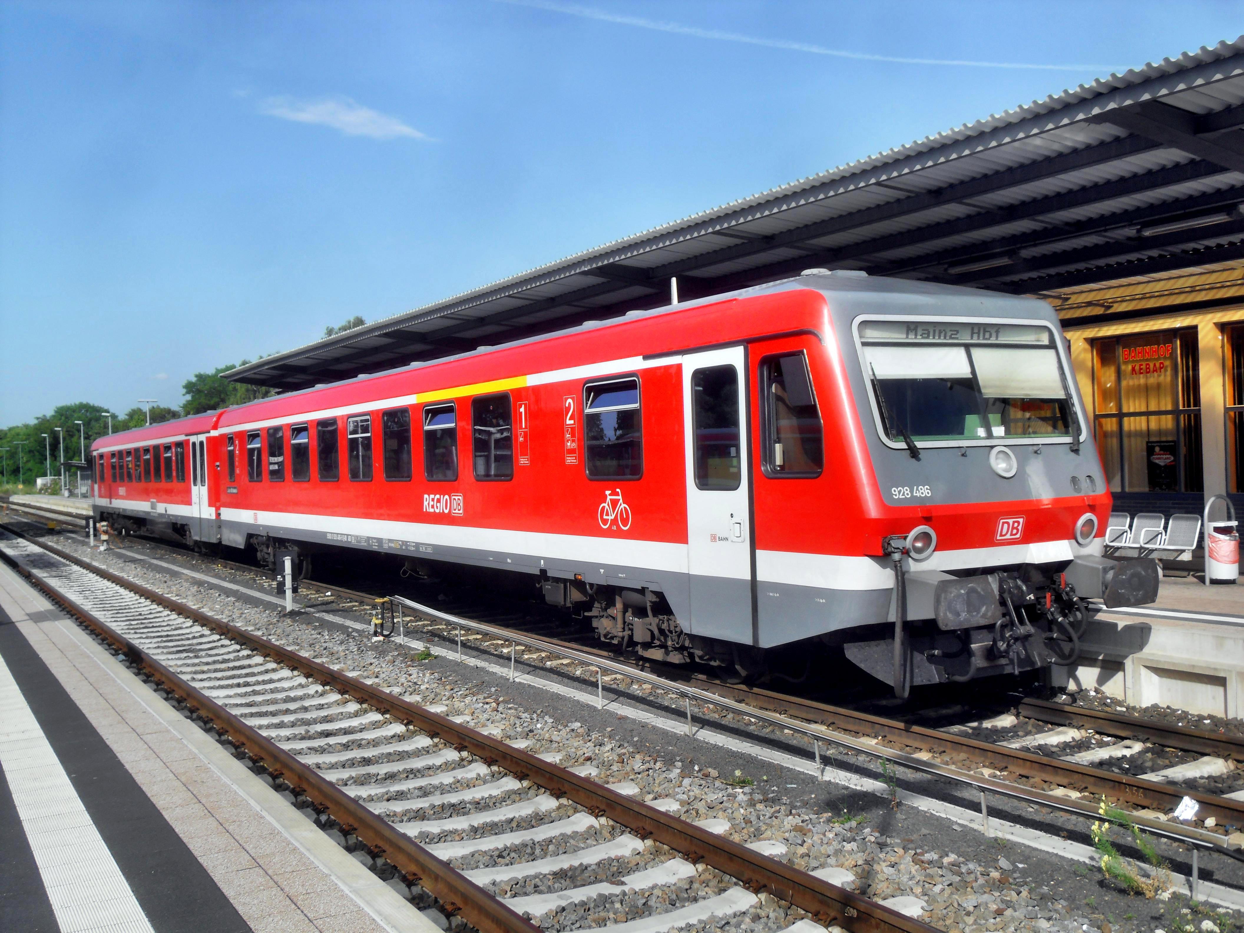 RegionalBahn mit Triebwagen der DB-Baureihe 628 im Alzeyer Bahnhof auf dem Weg nach Mainz in Rheinhessen über die Bahnstrecke Mainz–Alzey (Deutschland)